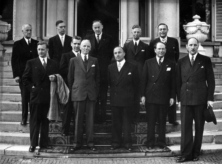 Op het bordes van Paleis Soestdijk staan de nieuwe ministers van het tweede Kabinet Drees (1952-1956). Op de voorste rij: Suurhoff, Donker, Van der Kieft, Cals, Beyen, Luns. Op de achterste rij: De Bruijn, Zijlstra, Kernkamp, Algera, Witte. 2 september 1952.